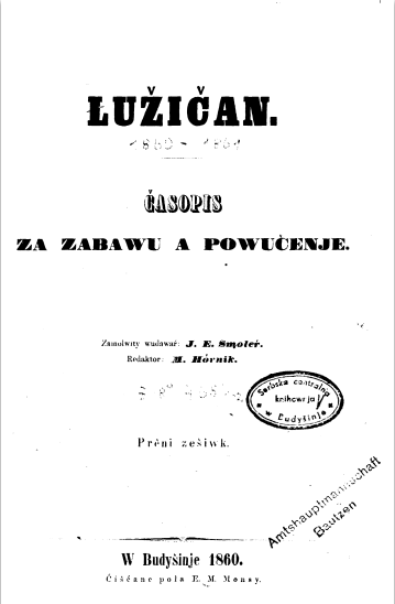 Журнал "Łužičan", 1860